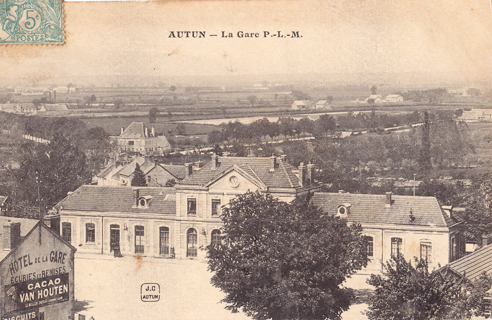 Carte postale ancienne éditée par J. C.à Autun : AUTUN - La Gare P. L. M.